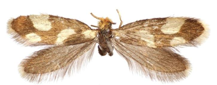 Epimartyria pardella